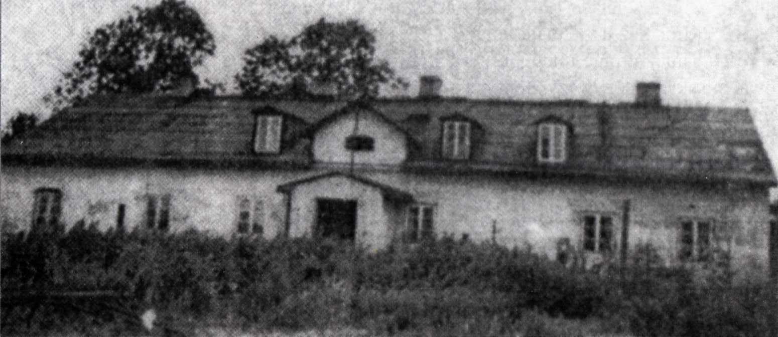 pierwsza siedziba gminy Skorosze (obecnie w granicach warszawskiej dzielnicy Ursus)